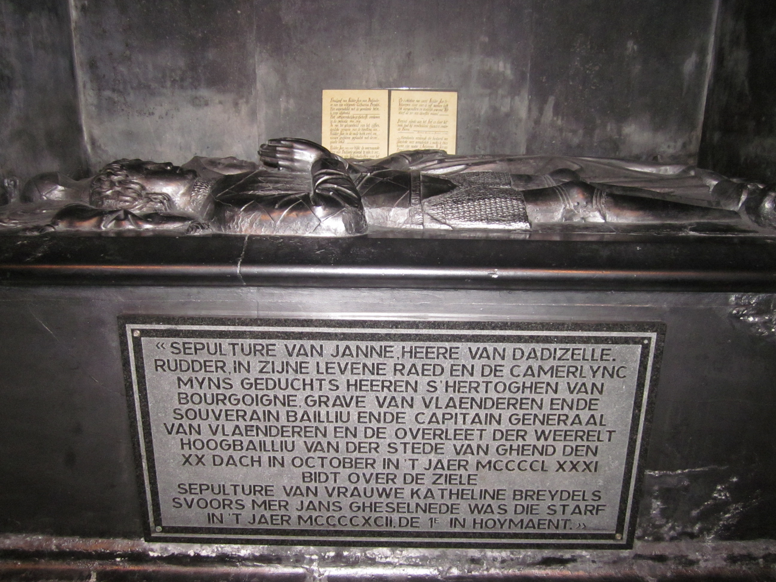 Praalgraf van Jan III van Veerdeghem, ridder Jan van Dadizele (1432-1481) en zijn vrouw Katheline Breydel in de crypte van de Basiliek van Onze-Lieve-Vrouw van Dadizele